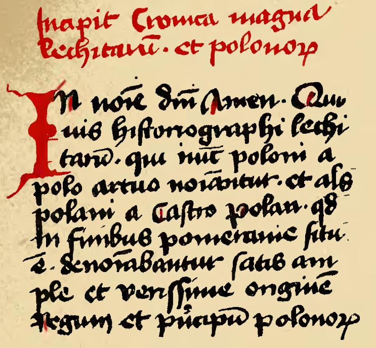 Początek Kroniki Wielkopolskiej w tzw. rękopisie Stanisława Augusta (Petersburskim) z XV wieku.